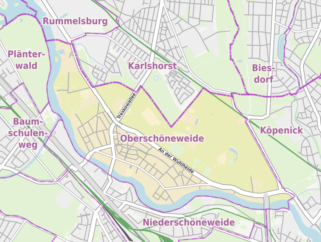 Übersichtskarte der Straßen und Ortslagen in Berlin-Oberschöneweide